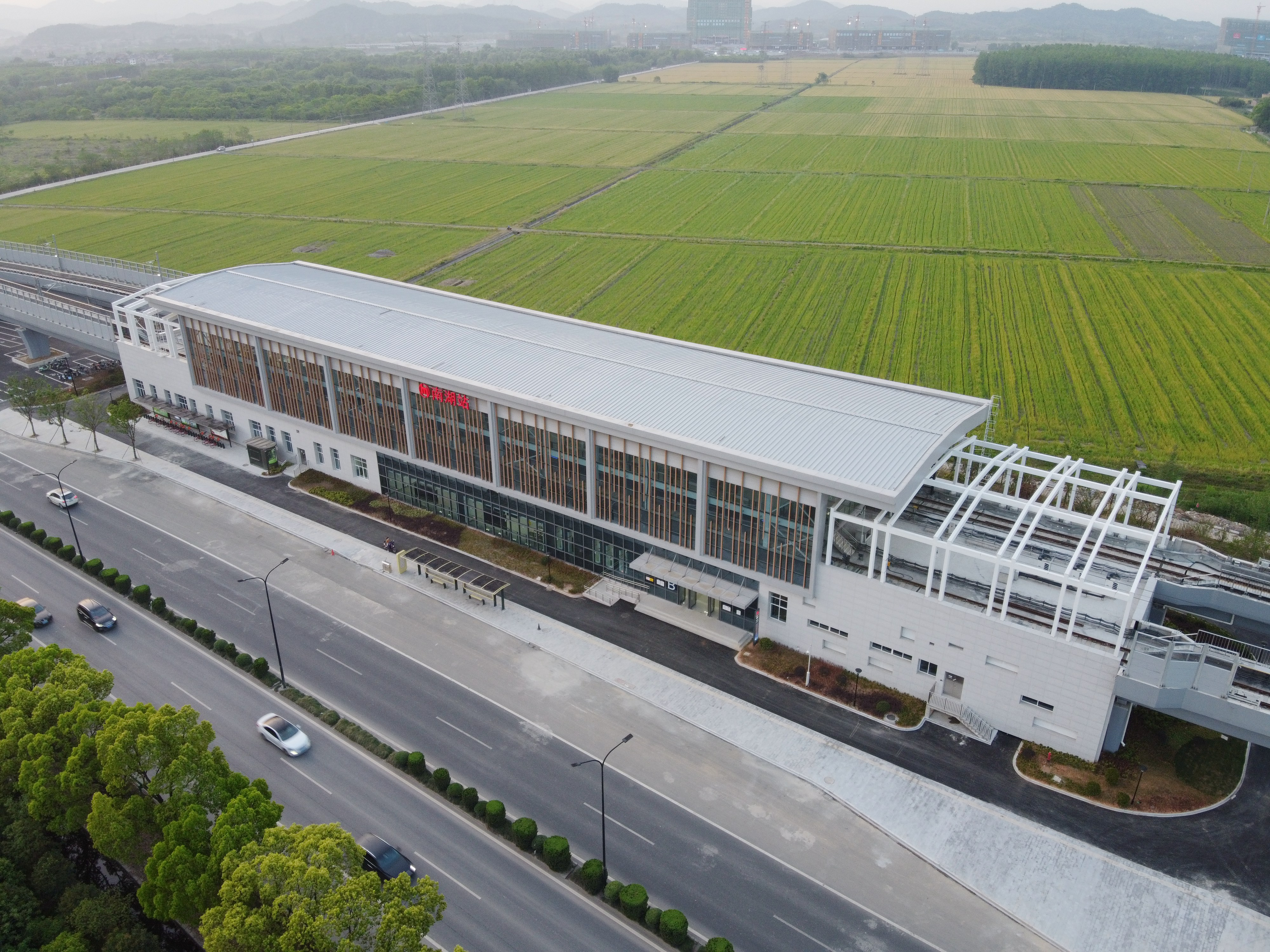 南湖站站房